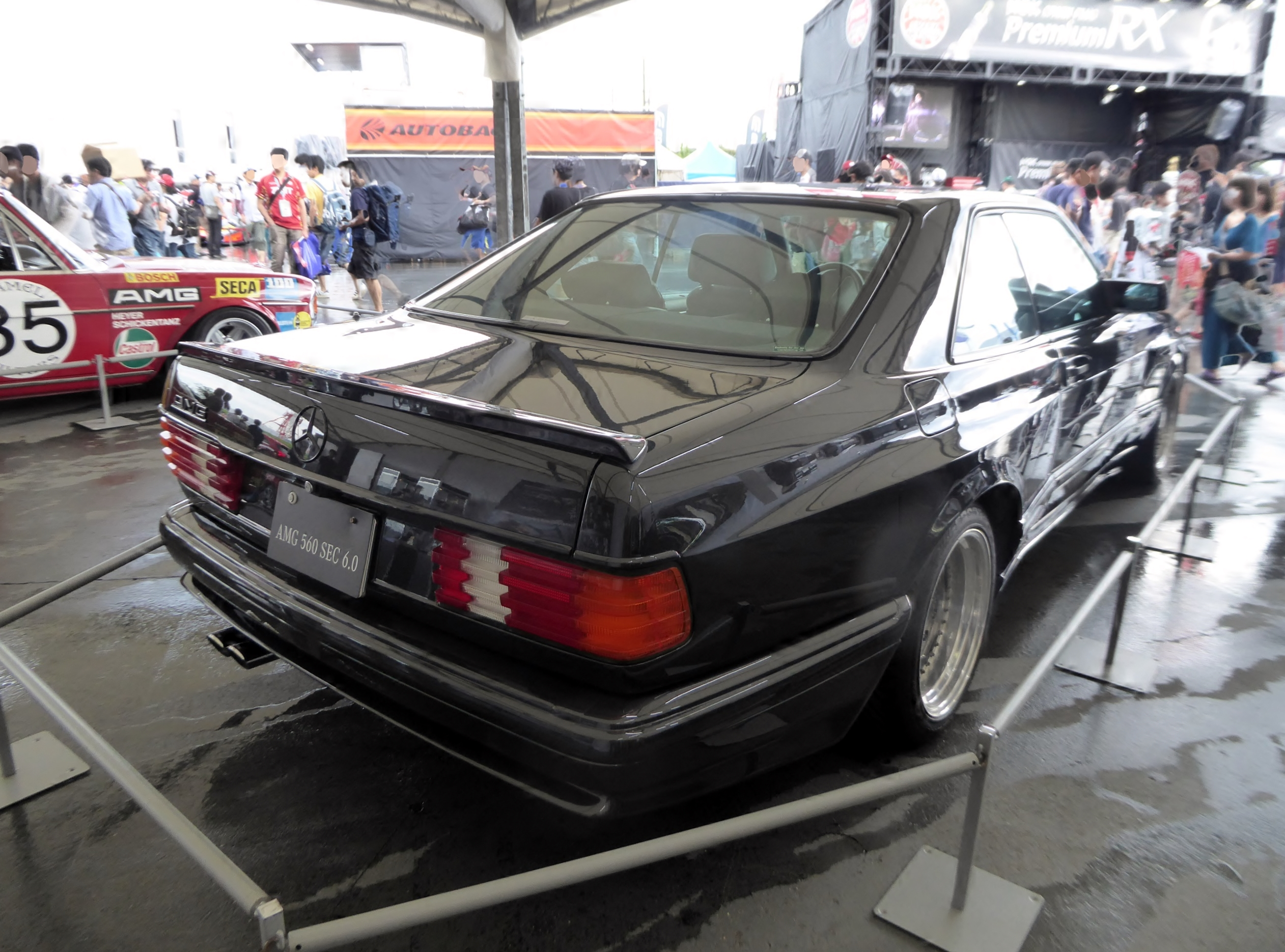 C126型メルセデス・ベンツ・AMG 560SEC 6.0をリアから撮影。